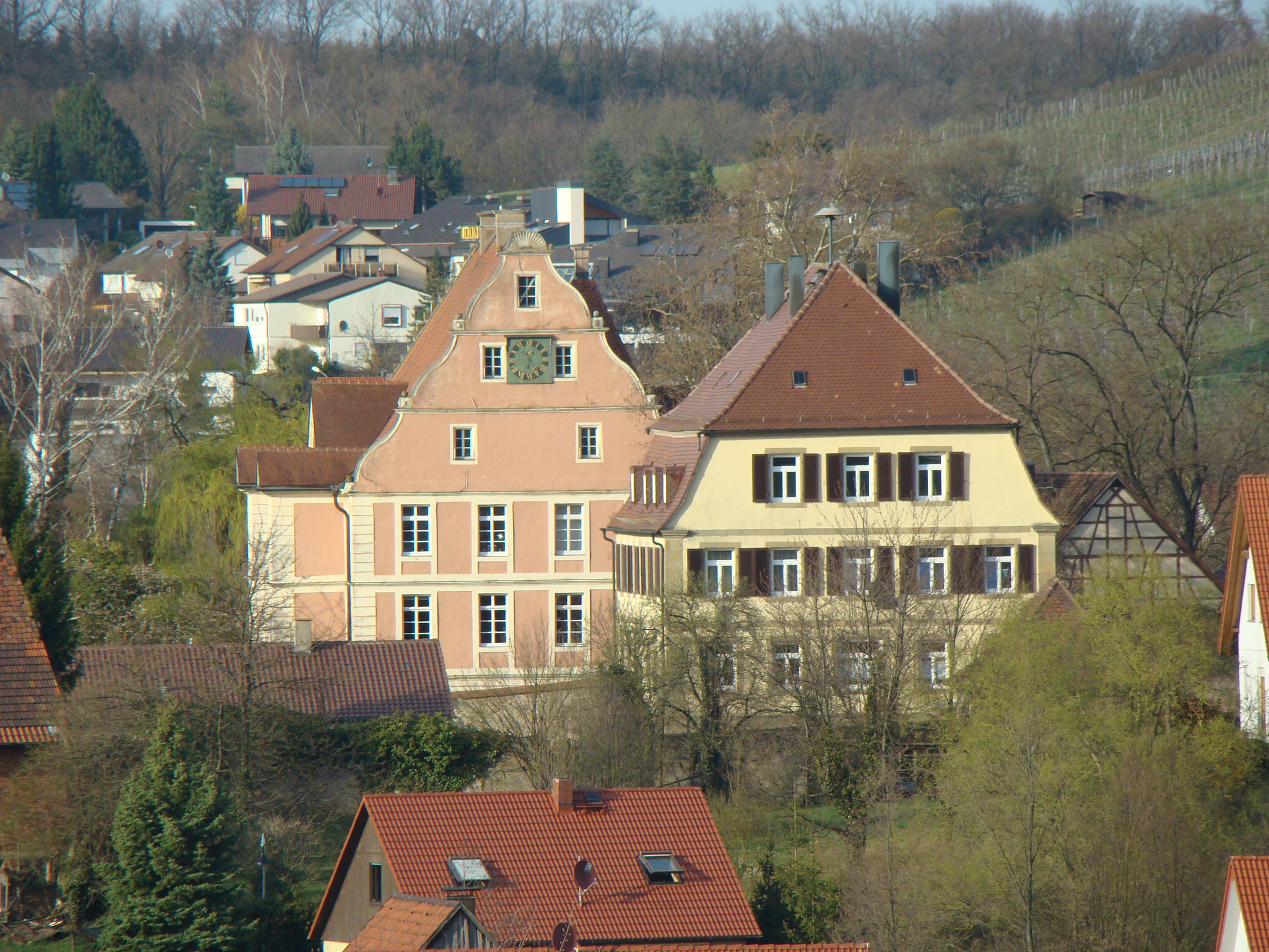 Schloss und Rathaus in Obersulm-Eschenau